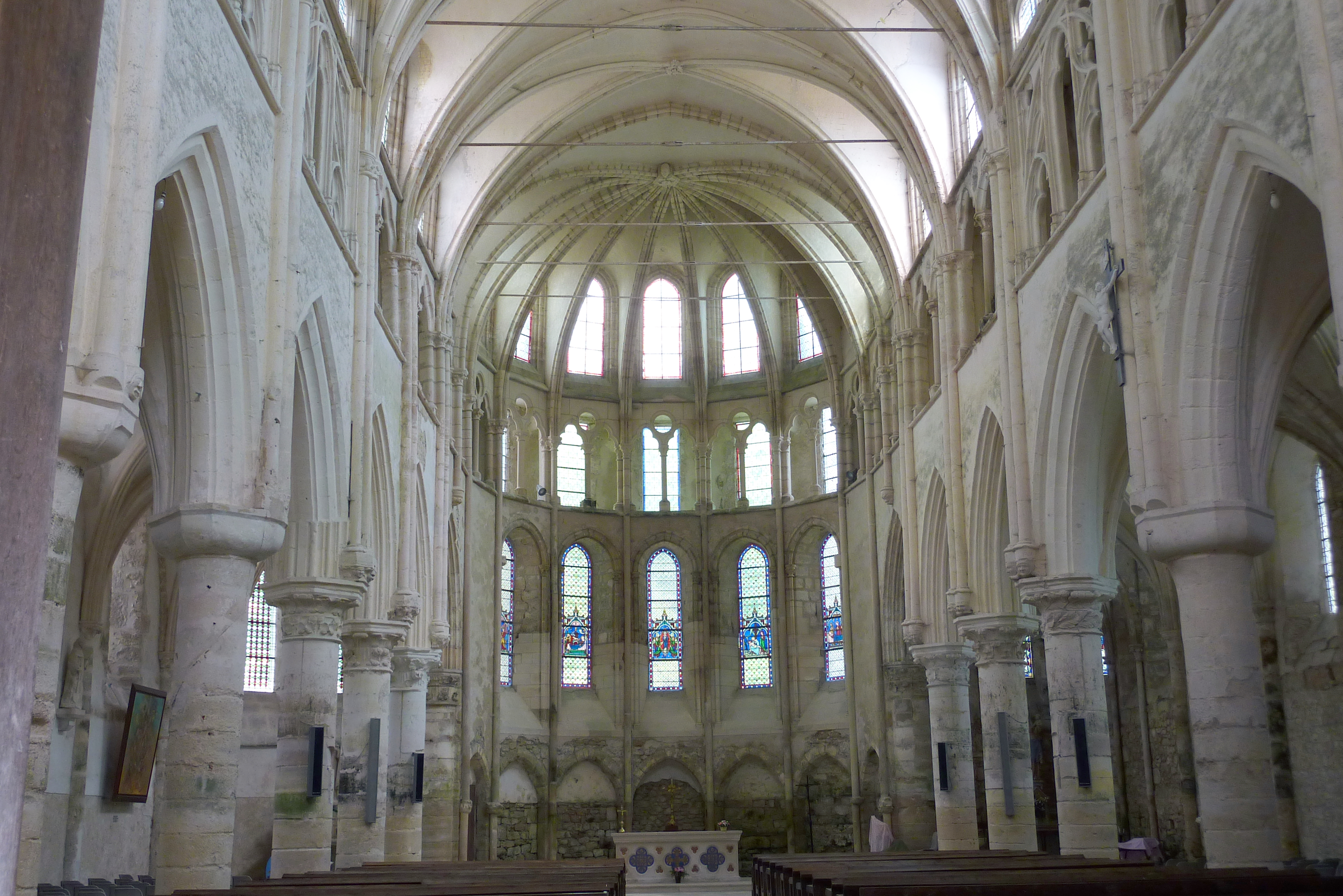 katholische Kirche Notre-Dame in Crécy-la-Chapelle